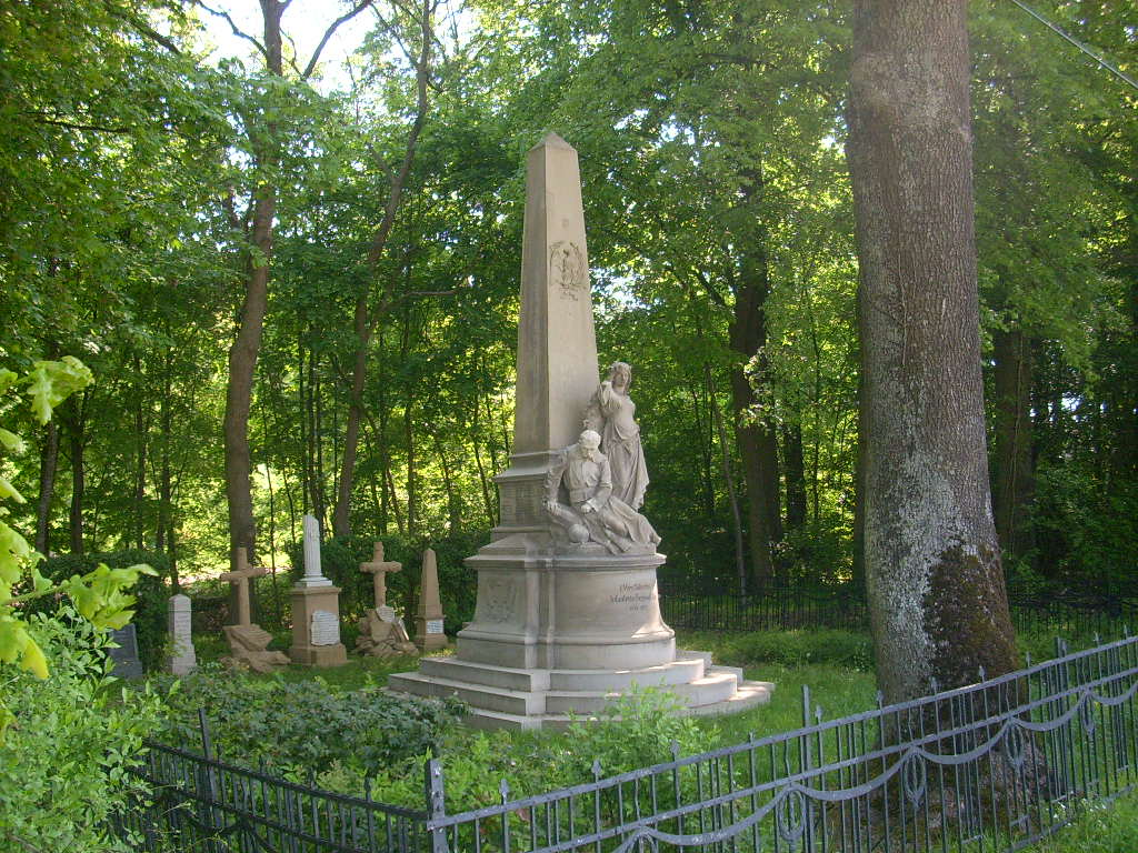 Monument aux morts du 1er Régiment d'infanterie Westphalien à Coincy (Moselle), hameau de Colombey près de Metz.